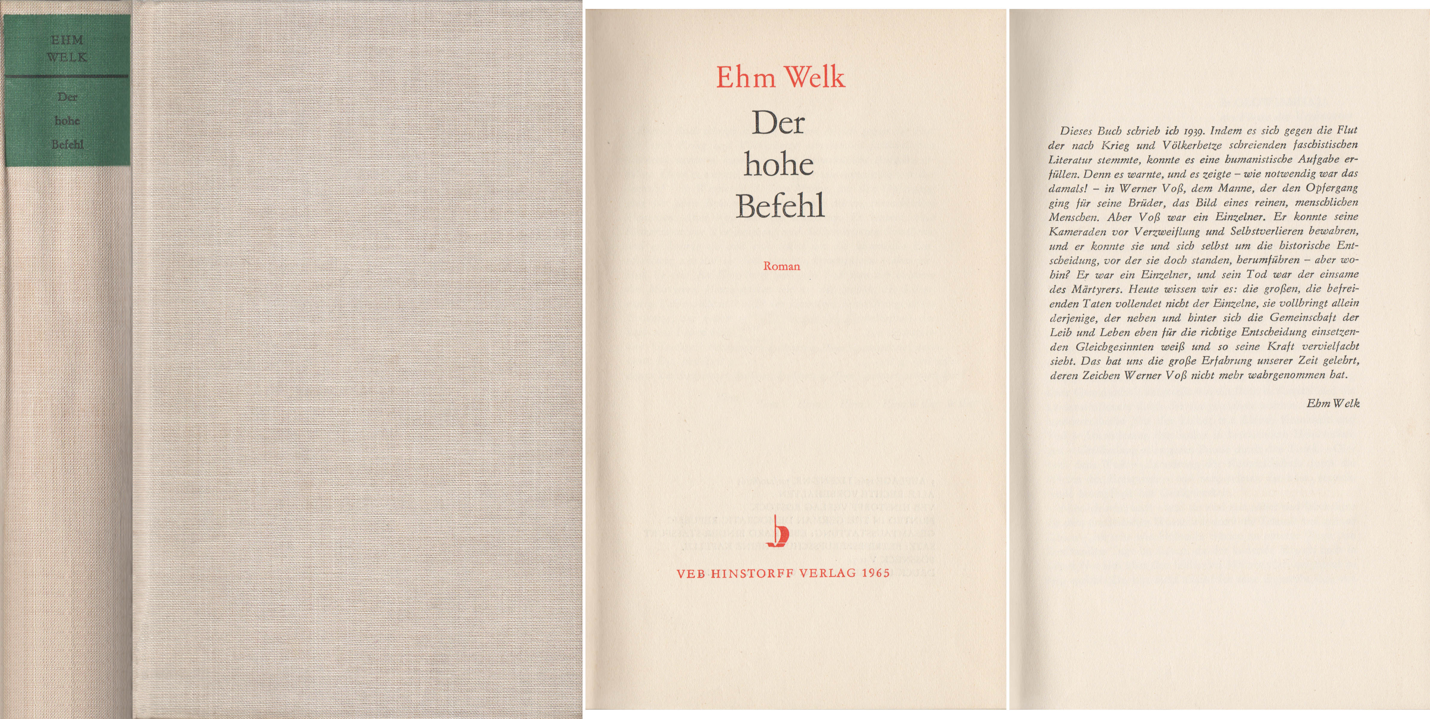 Der hohe Befehl, Autor Ehm Welk, VEB Hinstorff Verlag 3. Auflage 1965